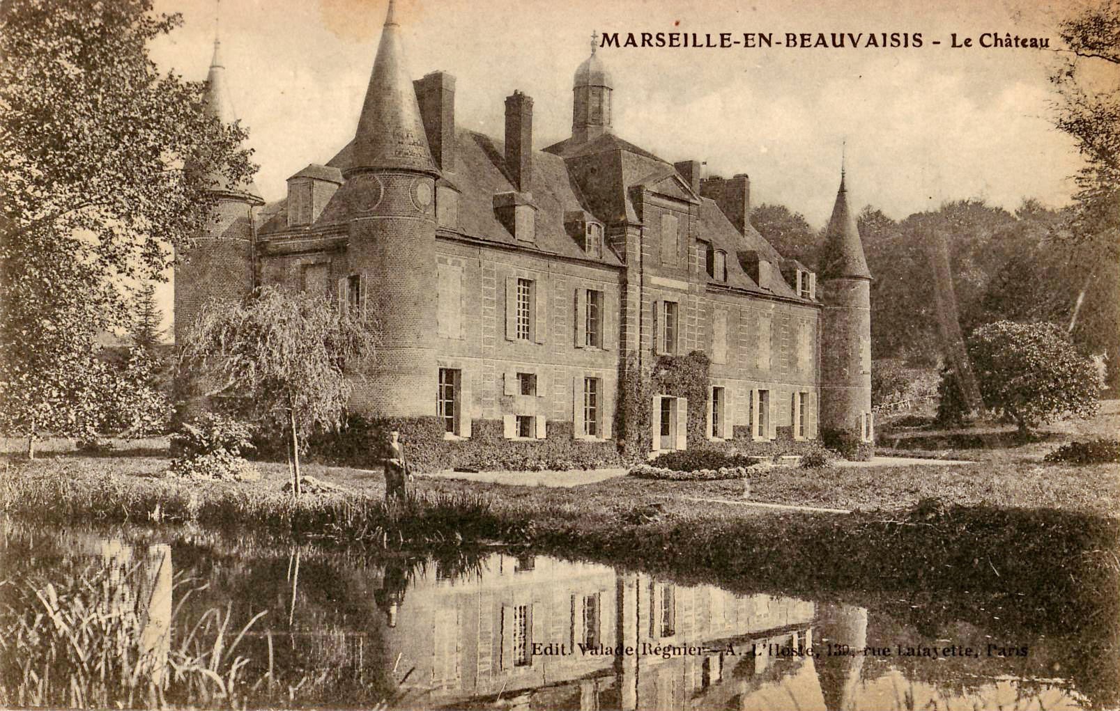 Carte postale ancienne éditée par Valade-Régnier - A. L'Hoste à Paris : MARSEILLE-EN-BEAUVAISIS - Le Château